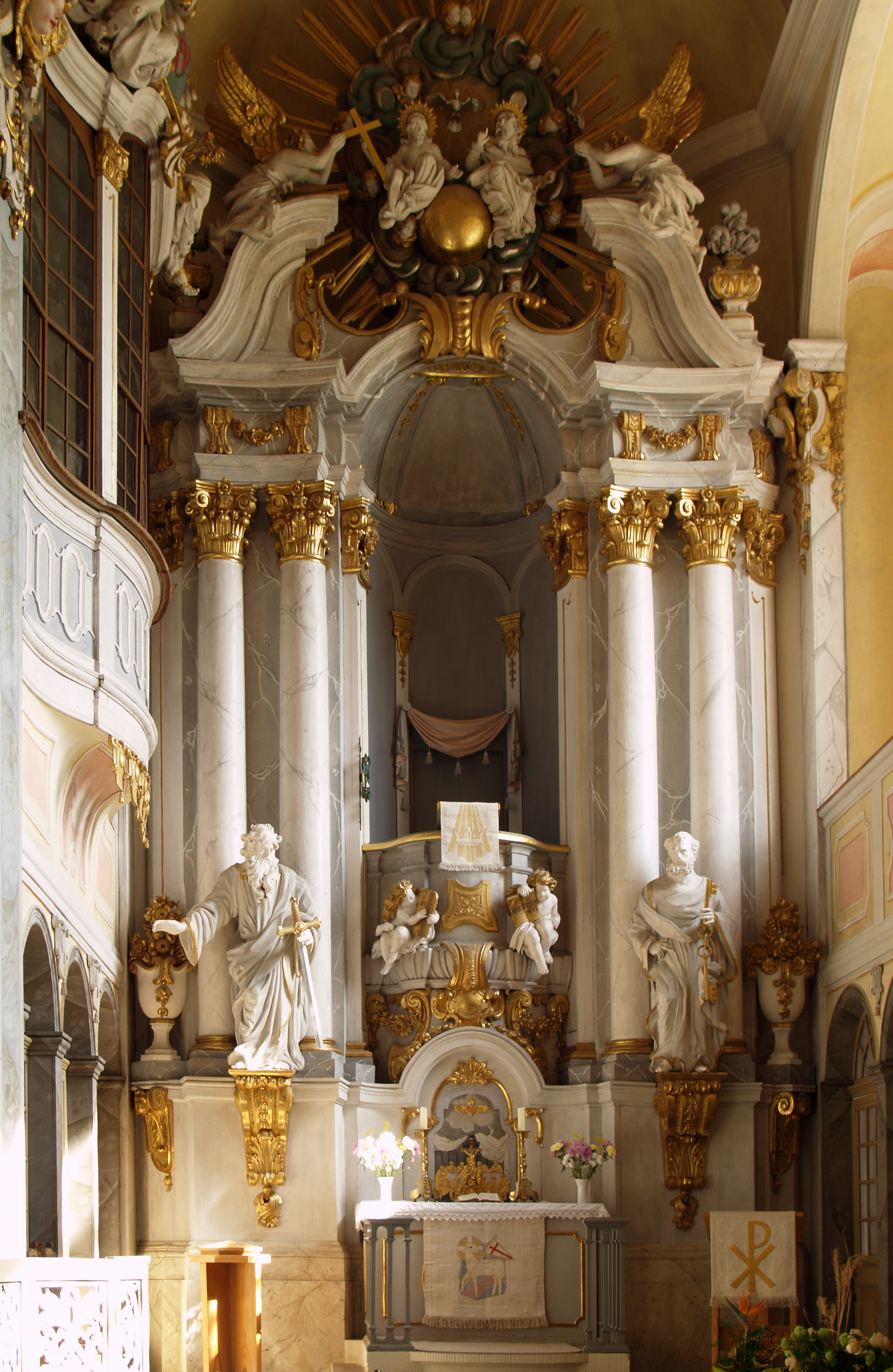 Schloss Weesenstein, Hochaltar der Schloßkirche